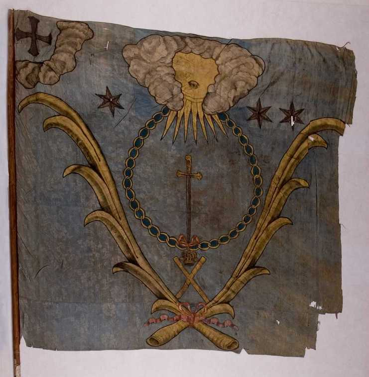 En kompanifana för Semjonovskijregementet tagen som trofé under slaget vid Narva år 1700.